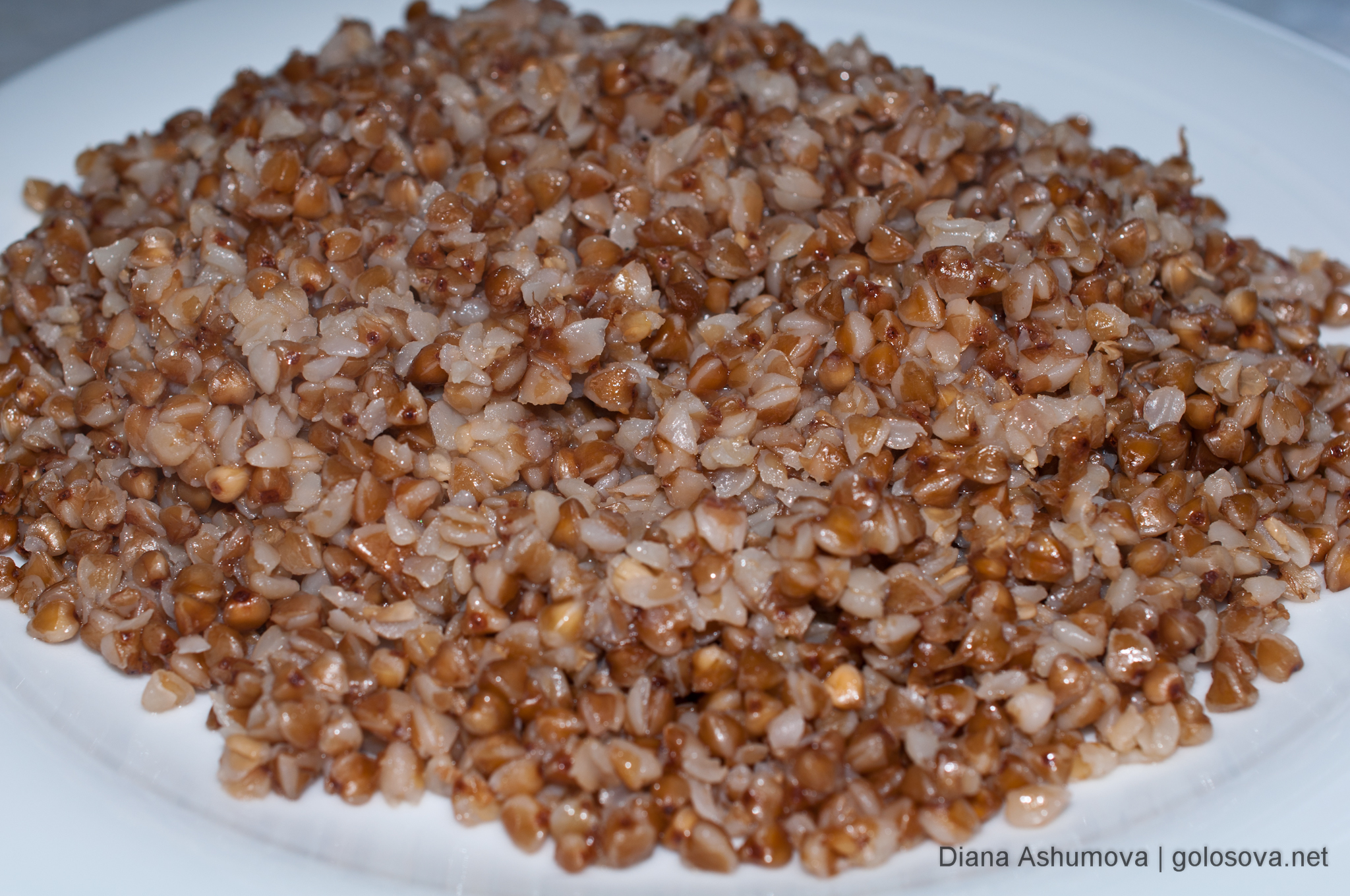 Гречневая каша.